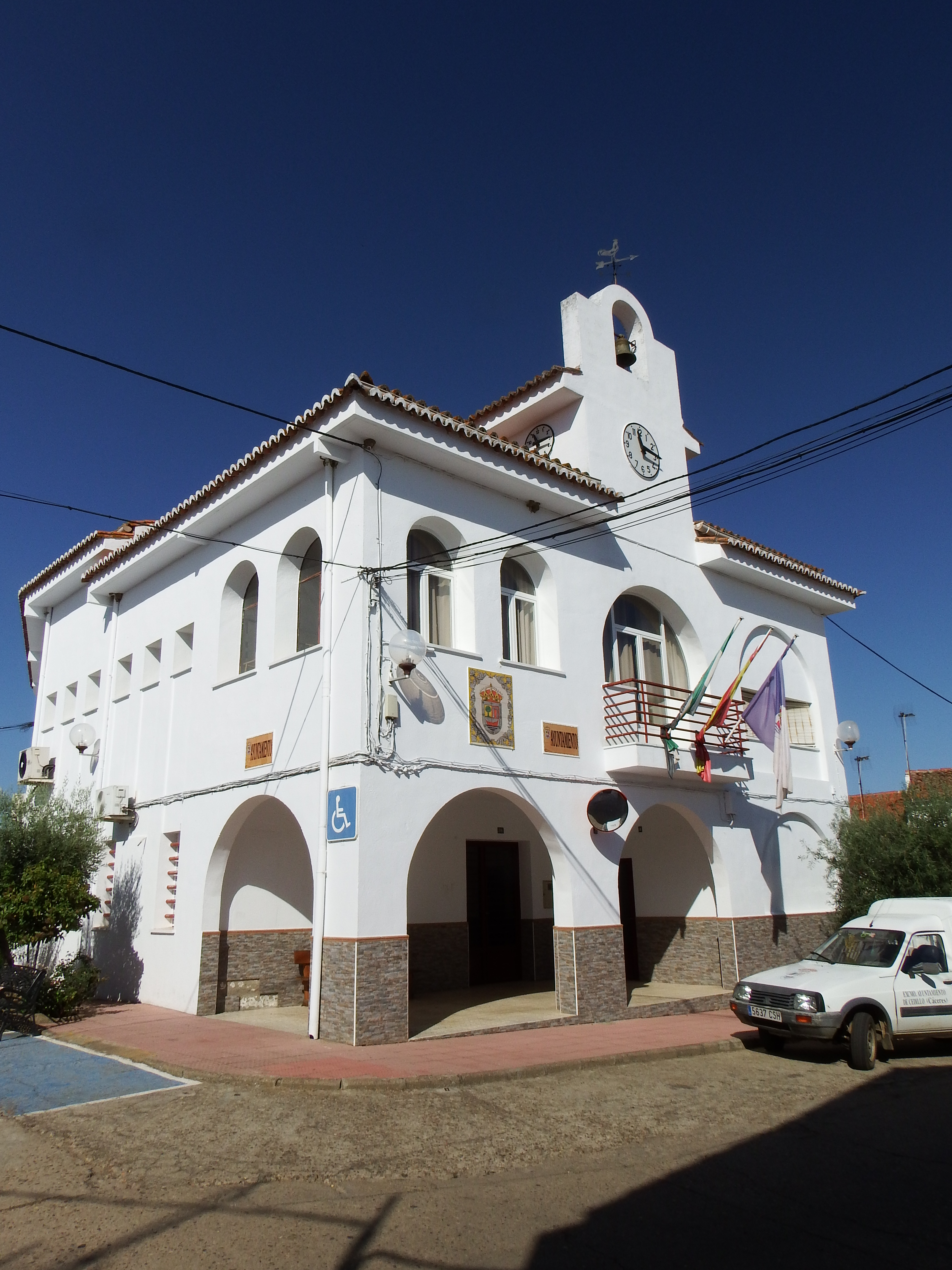 Cedillo